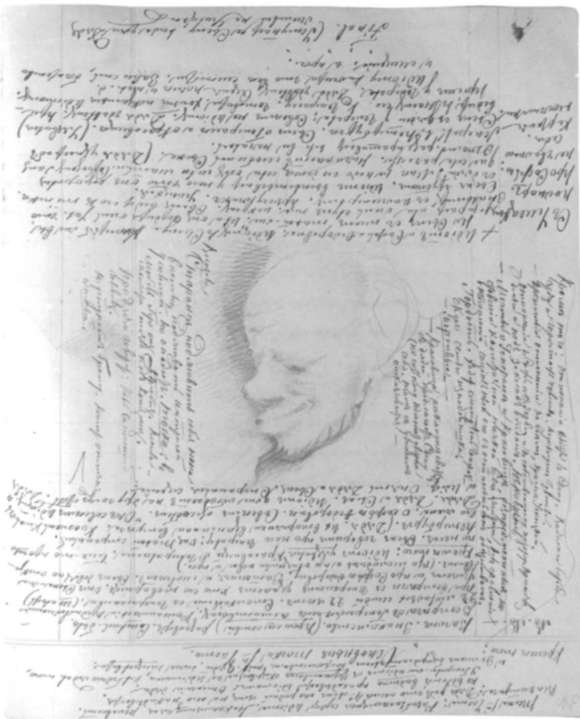 Рисунки и рукописный текст Ф.М. Достоевского. "Идиот"